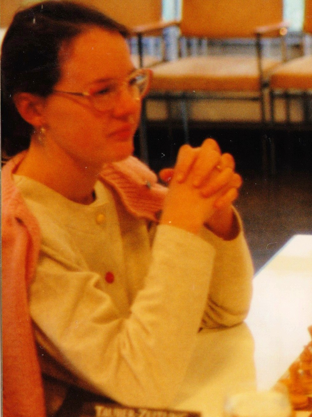 Marina Olbrich, Finale der deutschen Damenmeisterschaft 1993 in Bad Mergentheim.